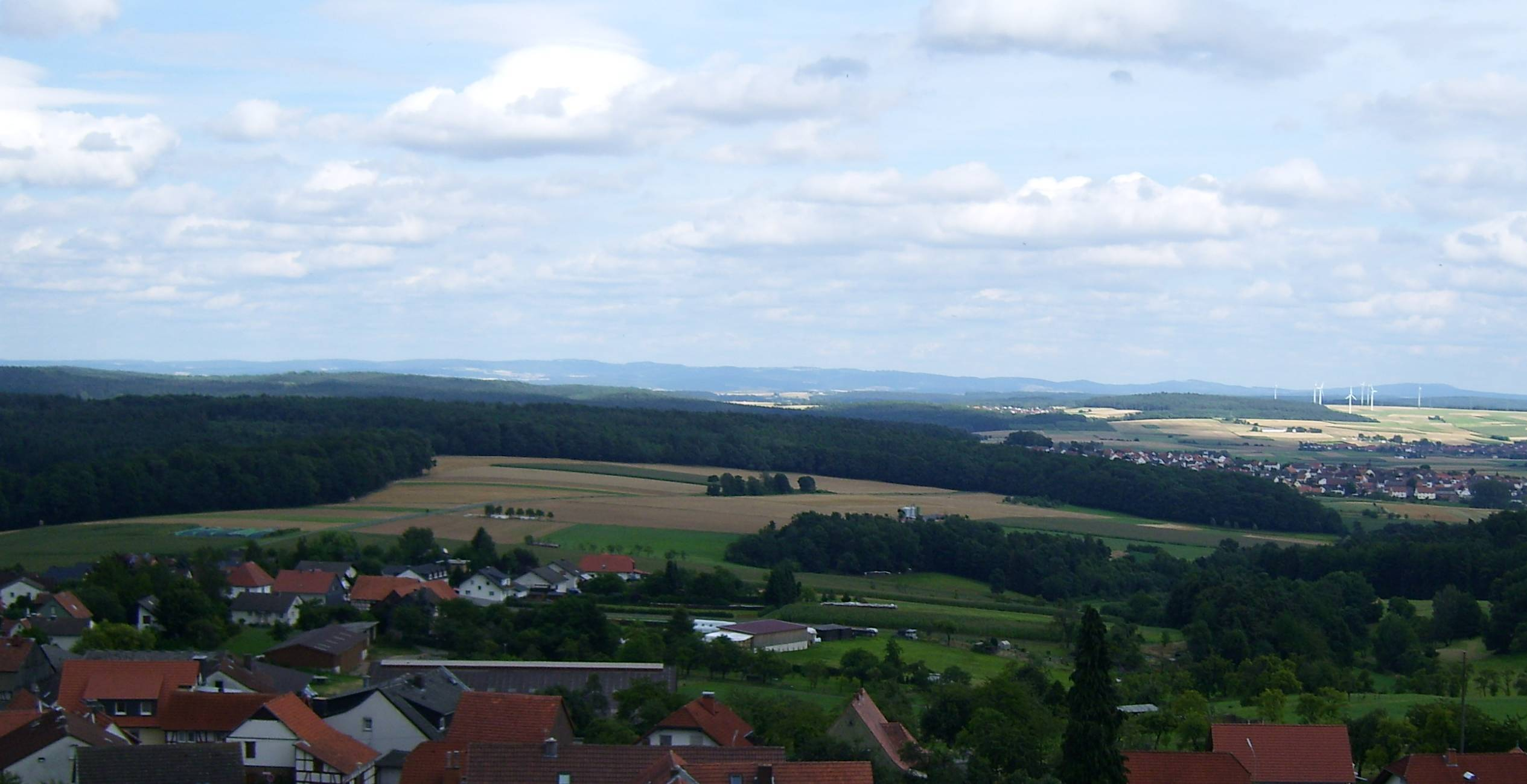 Blick vom 380 m hohen Burgholz auf den bis 636 m hohen Knüll nebst Südausläufer Rimberg (592 m, rechts hinter den Windrädern); im Vordergrund der Kirchhainer Ortsteil Burgholz)